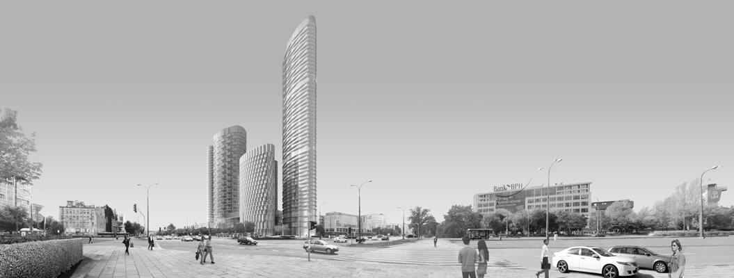 Zespół budynków biurowych wyskościowych przy ulicy Siennej/Towarowej w Warszawie